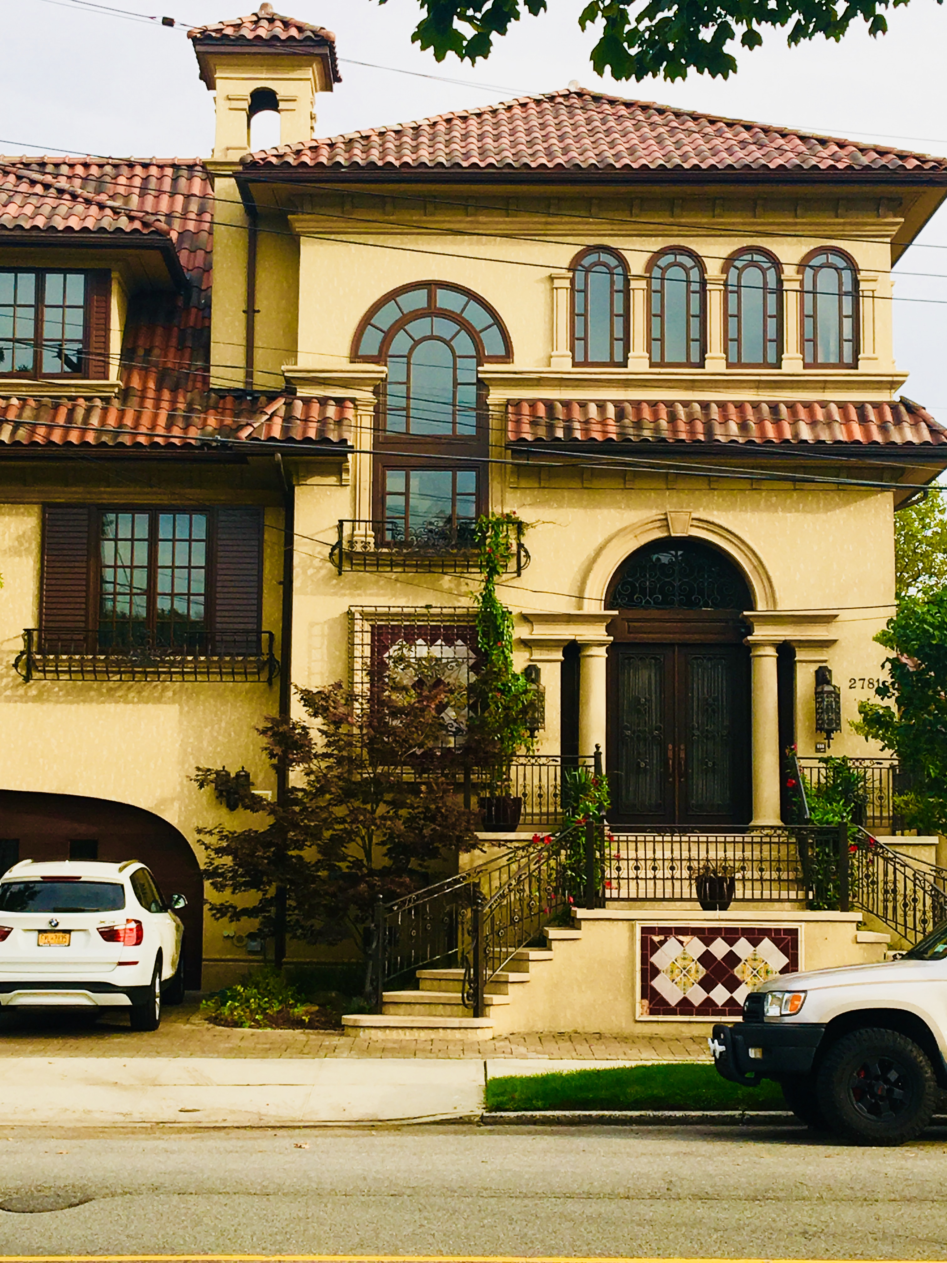 Brooklyn, Mill Basin